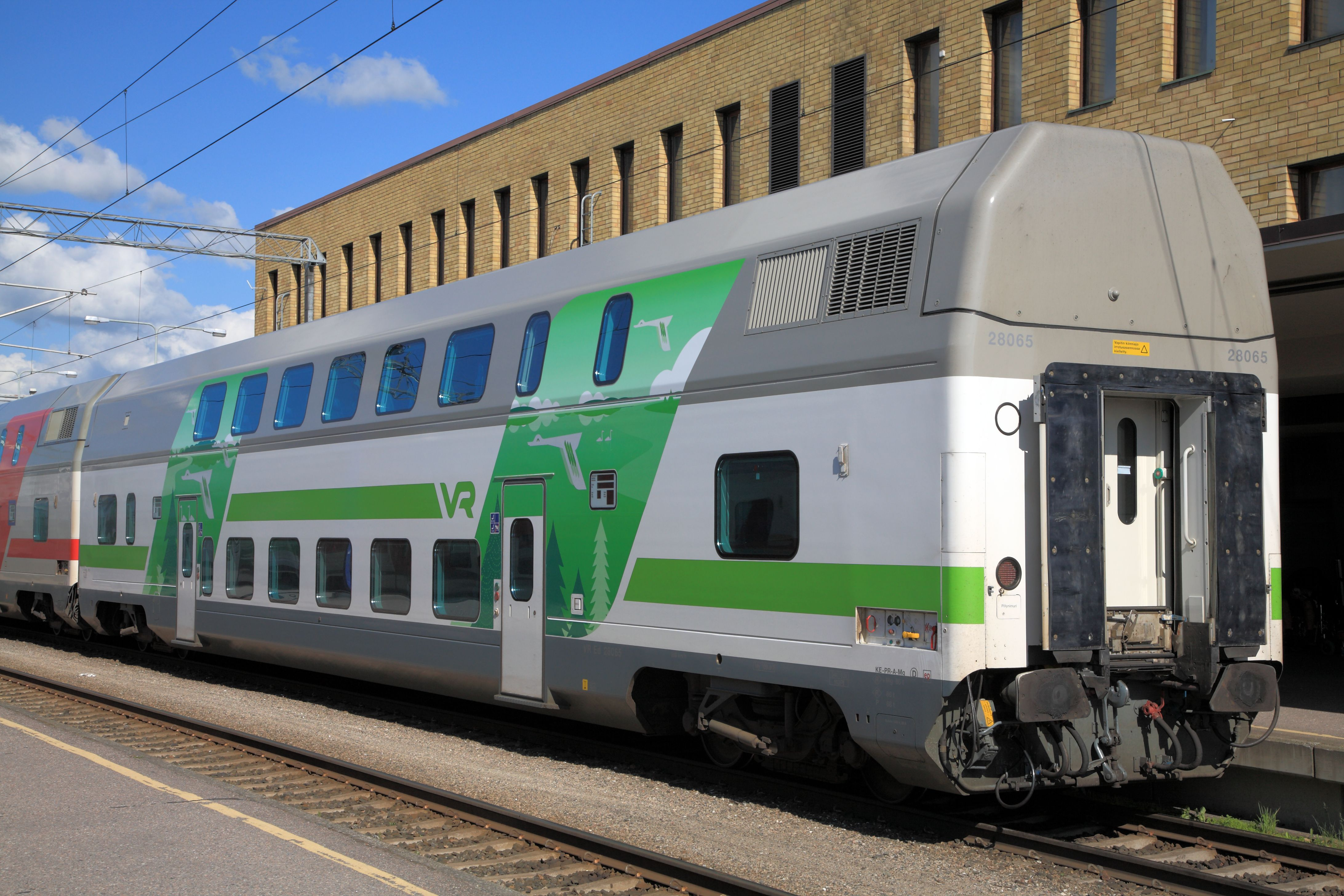 Doppelstocksitzwagen zweite Klasse. Die ersten Wagen dieser Bauart wurden mit nicht druckdichten Gummiwulstübergängen geliefert und erst später auf SIG-Übergänge umgerüstet.